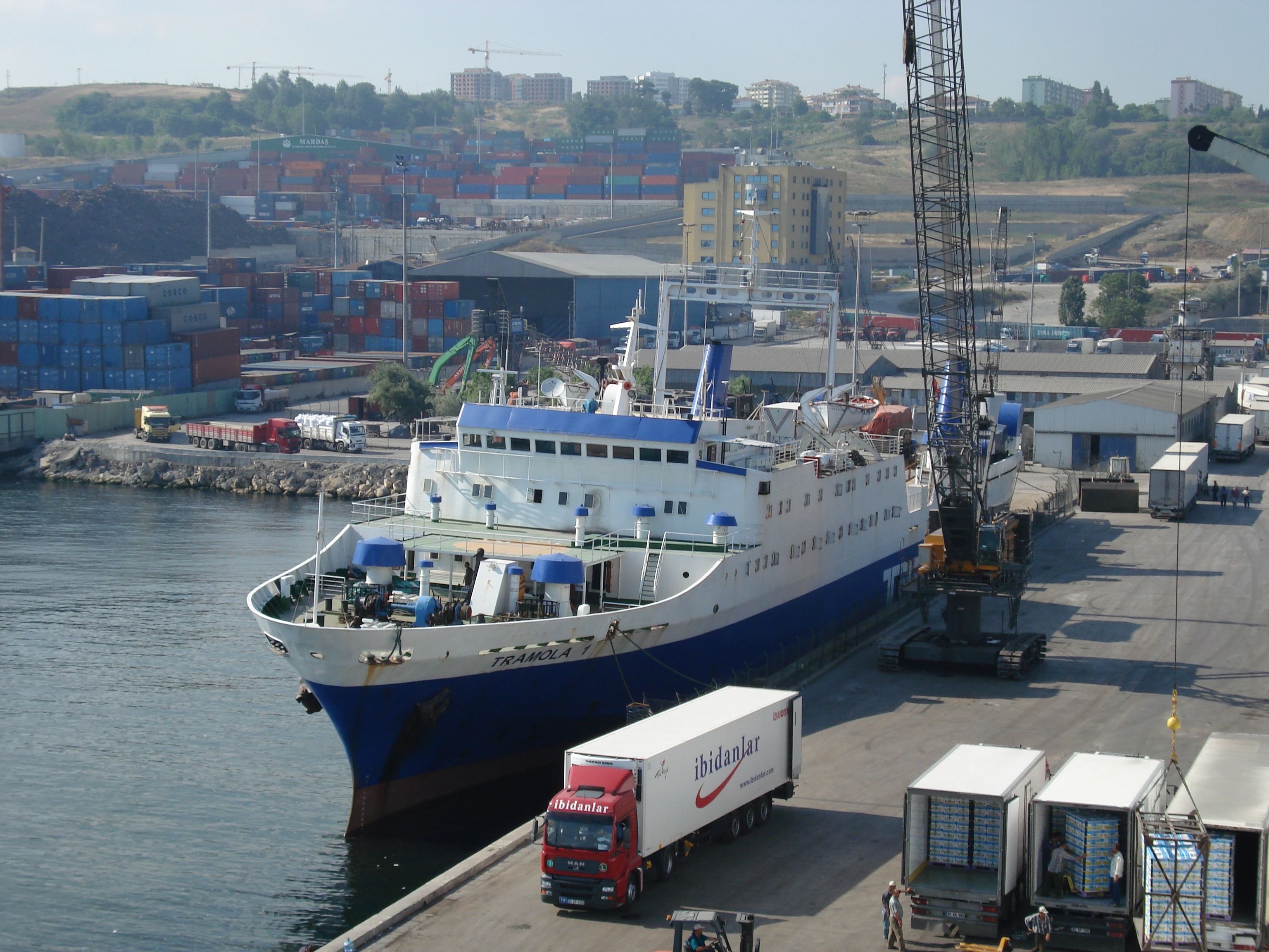 MV Tramola 1